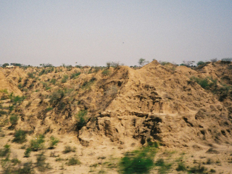 നശിച്ചുകൊണ്ടിരിക്കുന്ന ചമ്പൽക്കാട്.